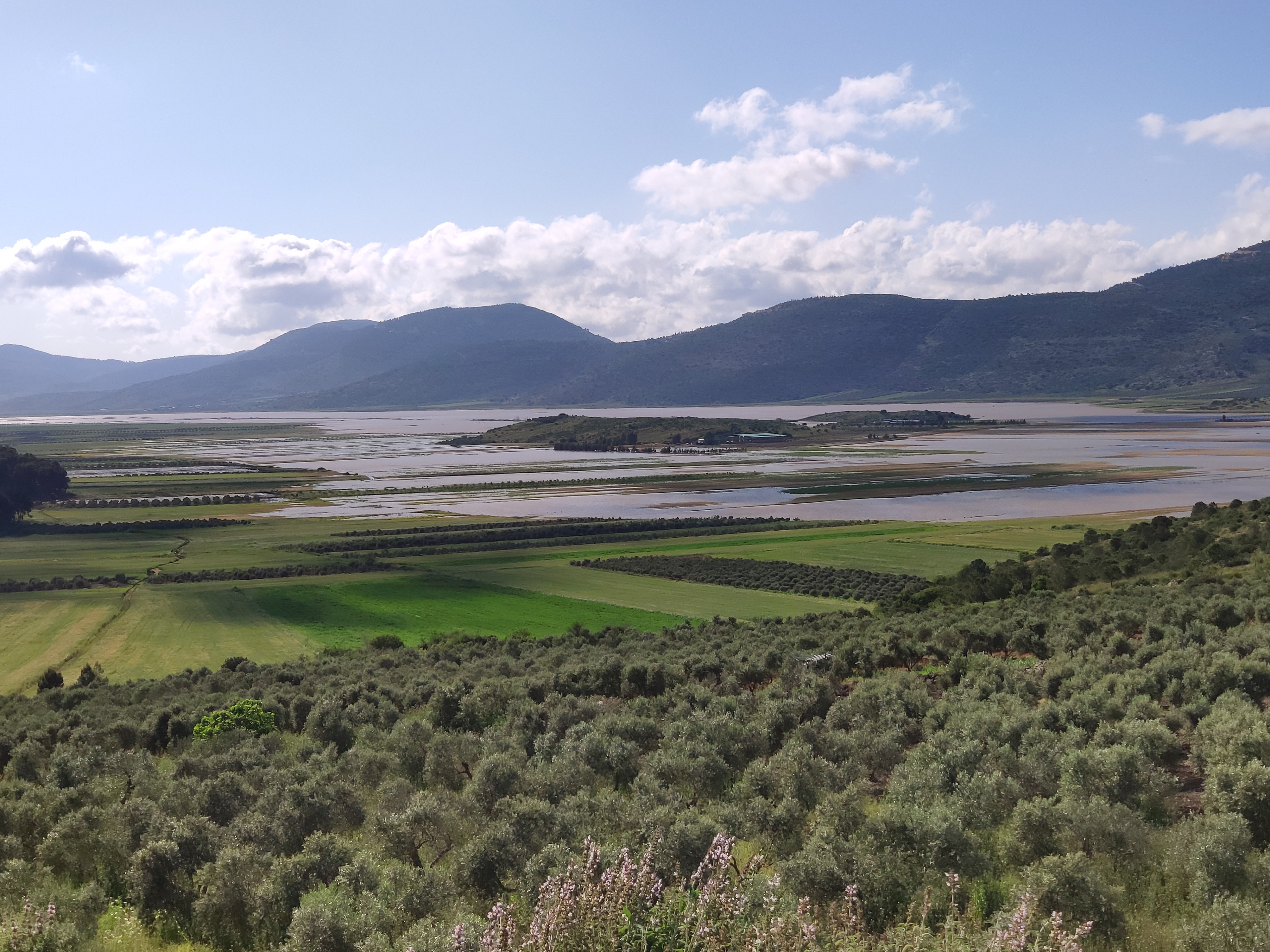 בקעת בית נטופה מוצפת, אפריל 2019